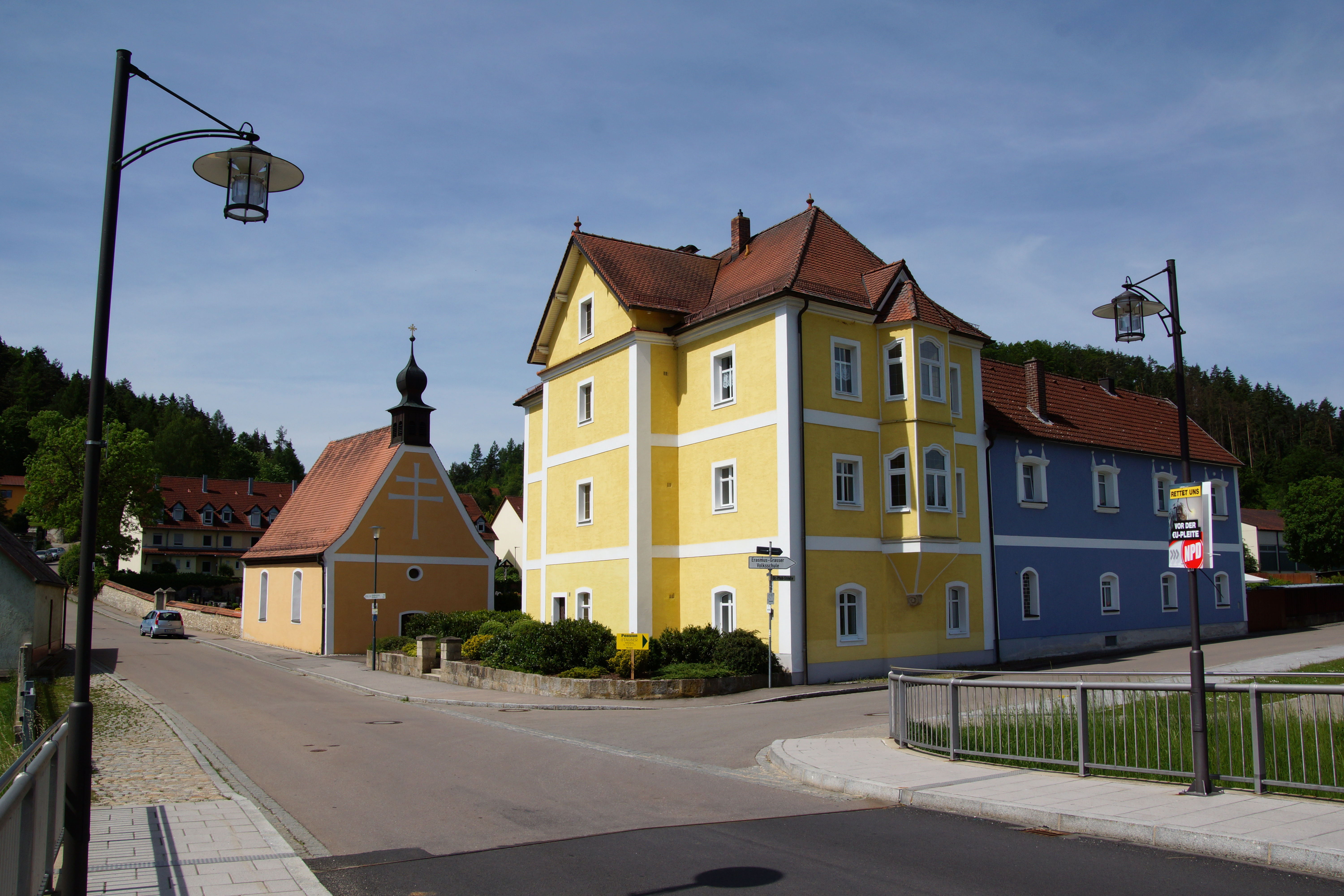 Der Oberpfälzer Markt Schmidmühlen an der Mündung der Lauterach in die Vils: Das sogenannte Zieglerschloss